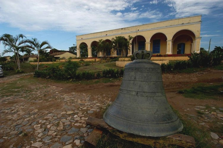 Cuba, september 2005, info in de Metadata